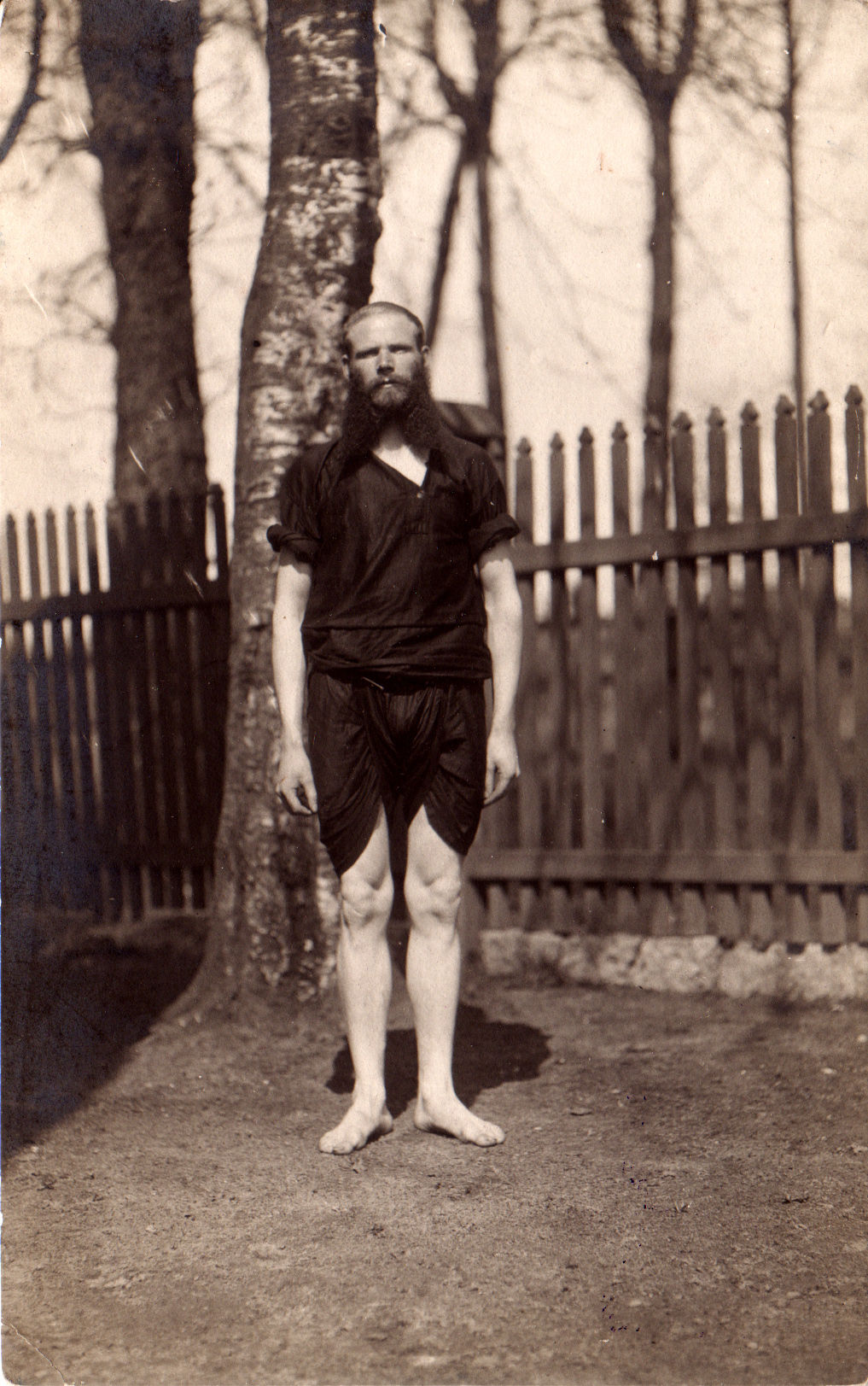 Karl Tõnisson